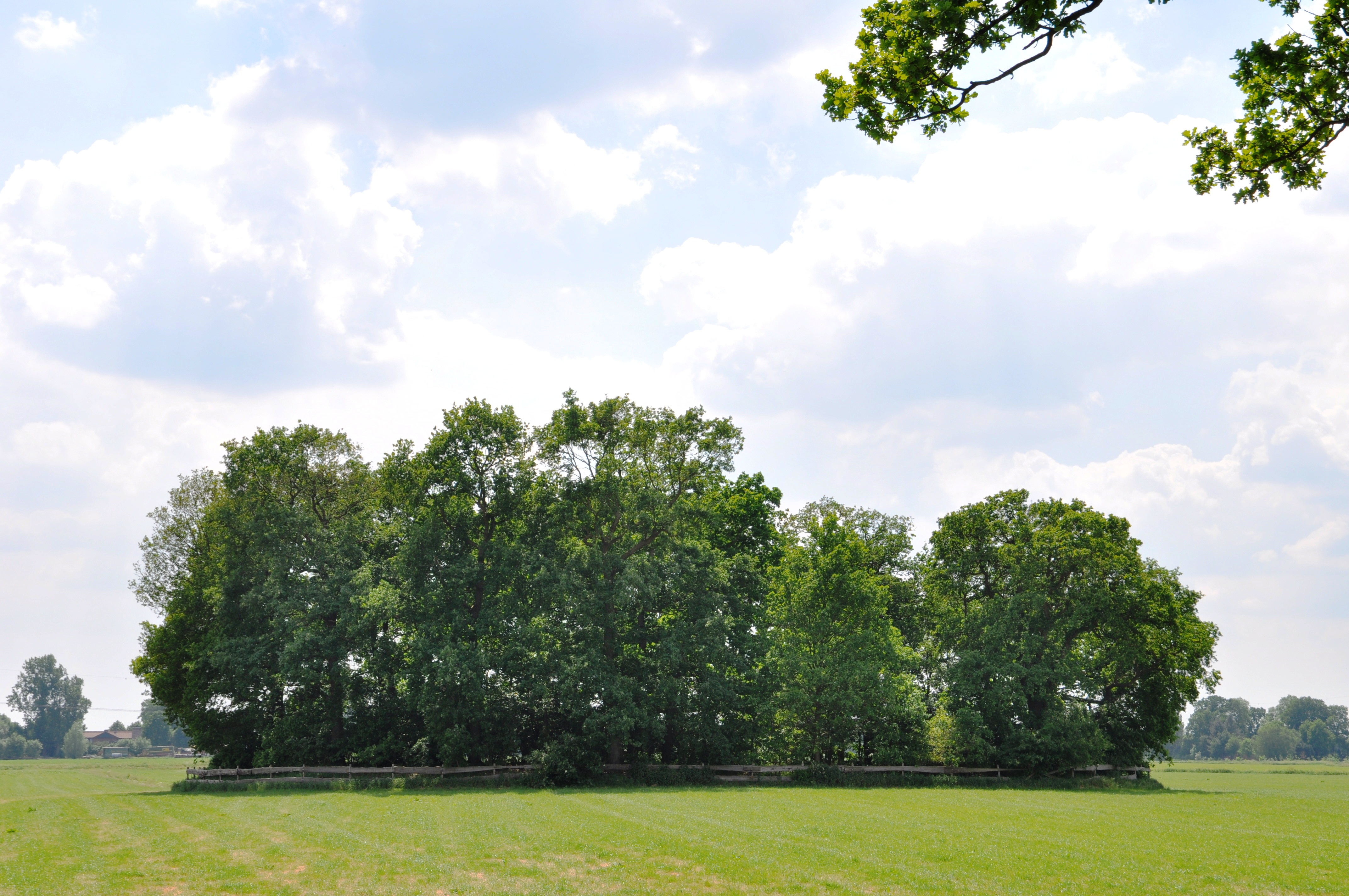 Kerkhof Buter aan de N863 tussen Nieuw-Schoonebeek en de Duitse grens.